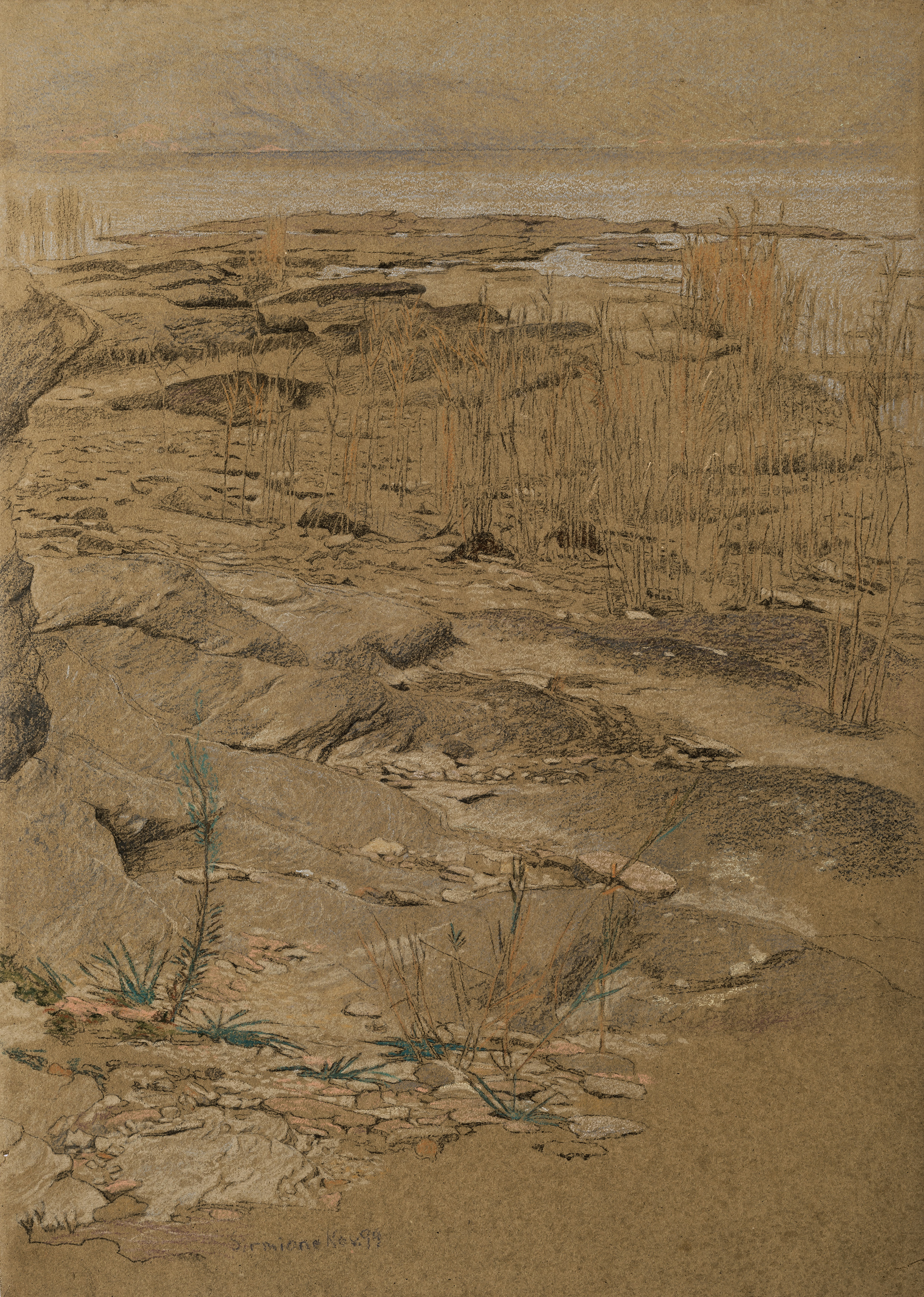 Otto Greiner: Ufer bei Sirmione am Gardasee, Pastellkreiden und Bleistift auf Papier, 32,3 x 23,0 cm, Links unten bezeichnet: „Sirmione Nov. 99“